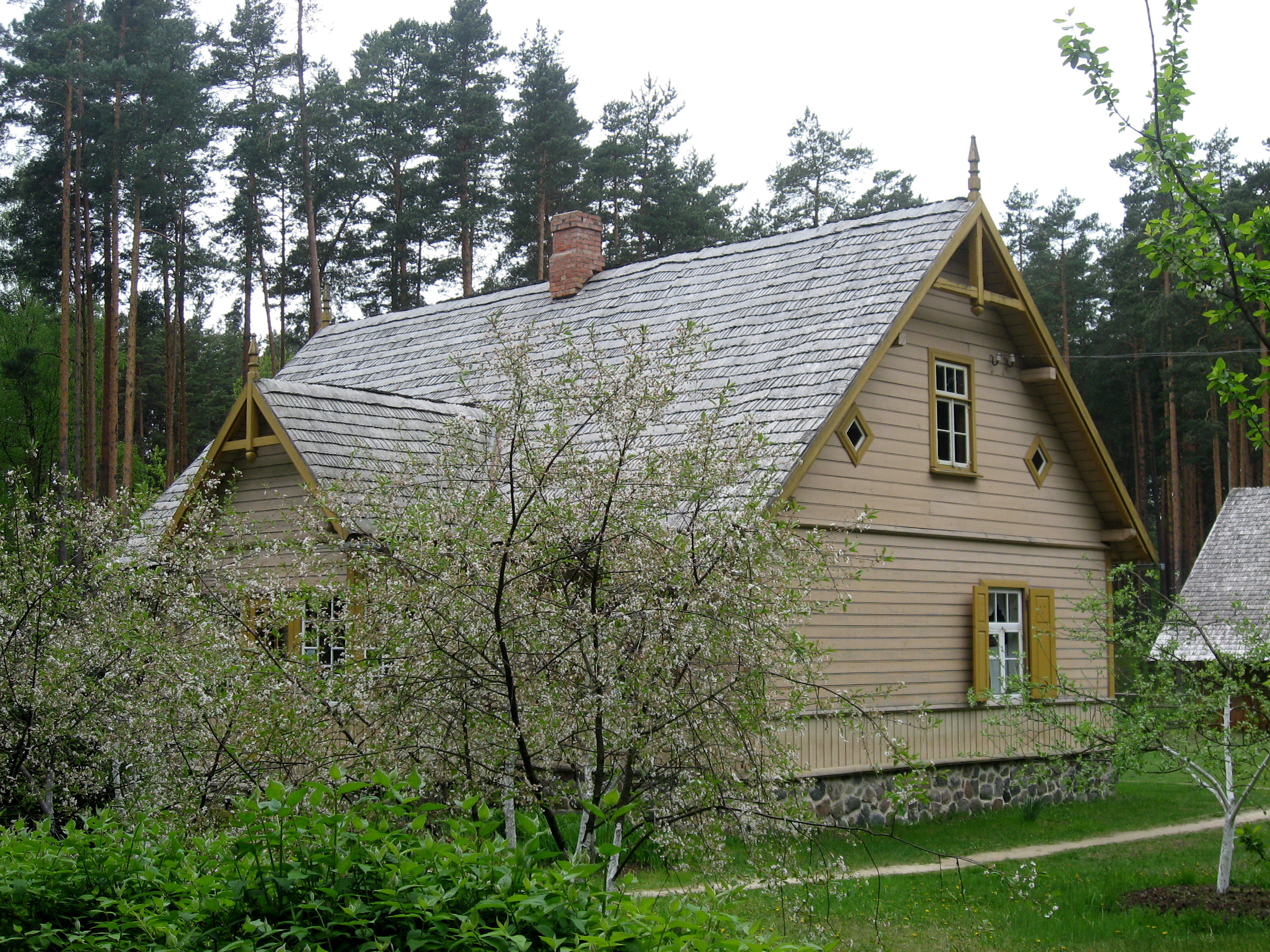 Lotyšské etnografické muzeum v přírodě: Obytný dům, oblast Vidzeme, Jaungulbene, "Kazaki", postaven v roce 1925